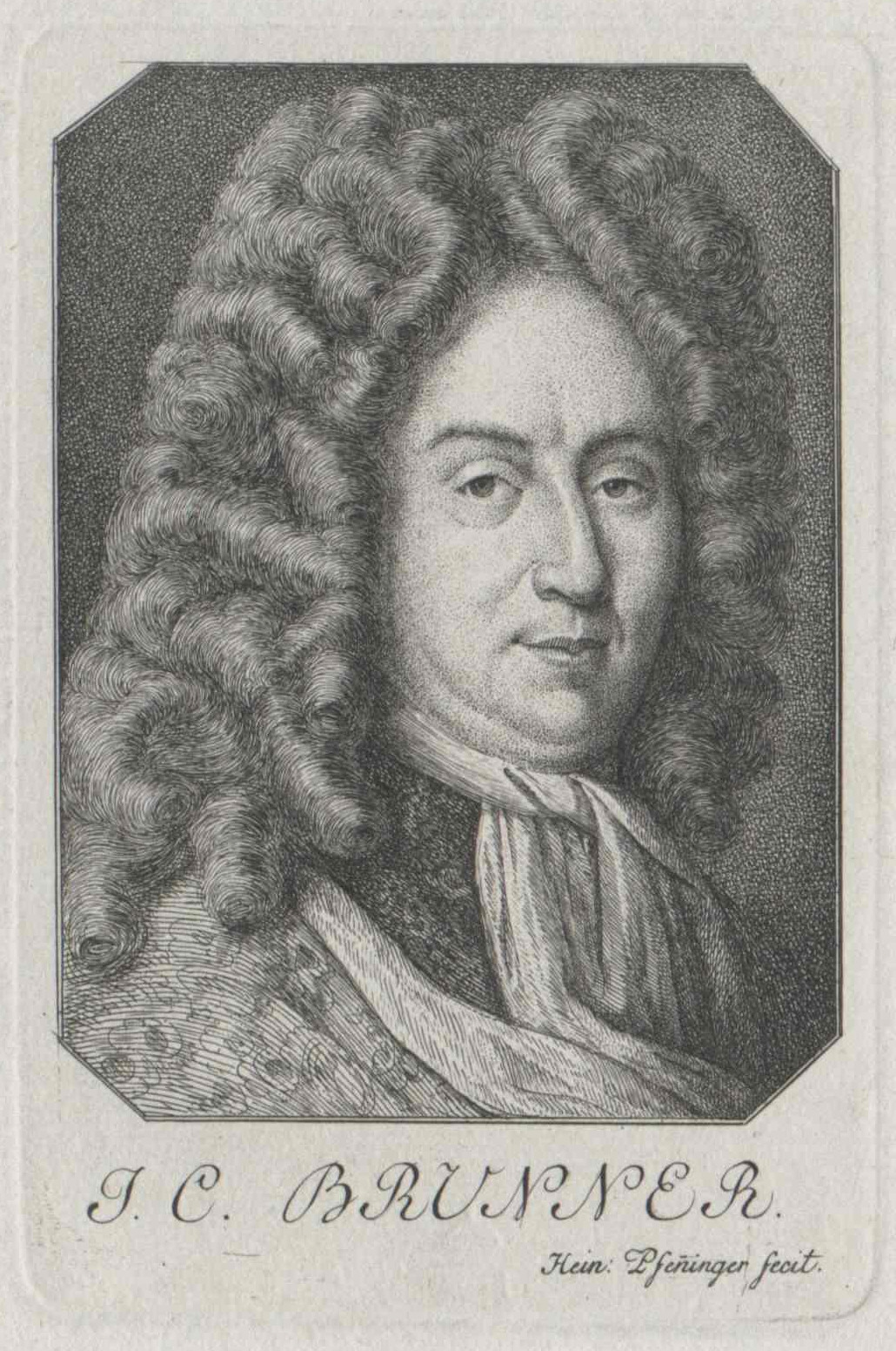 Johann Konrad Brunner